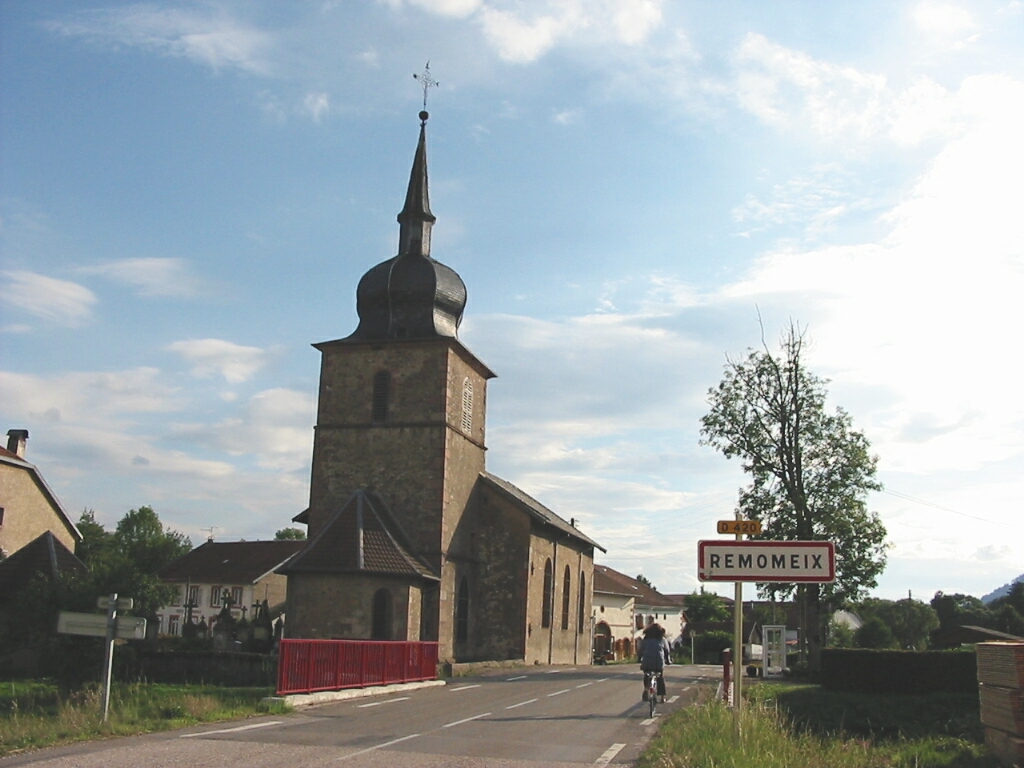 Remomeix Entrée nord du village Commune des Vosges Canton de Saint-Dié-des-Vosges-Est Photo personnelle du 3 août 2006. Copyright © Christian Amet